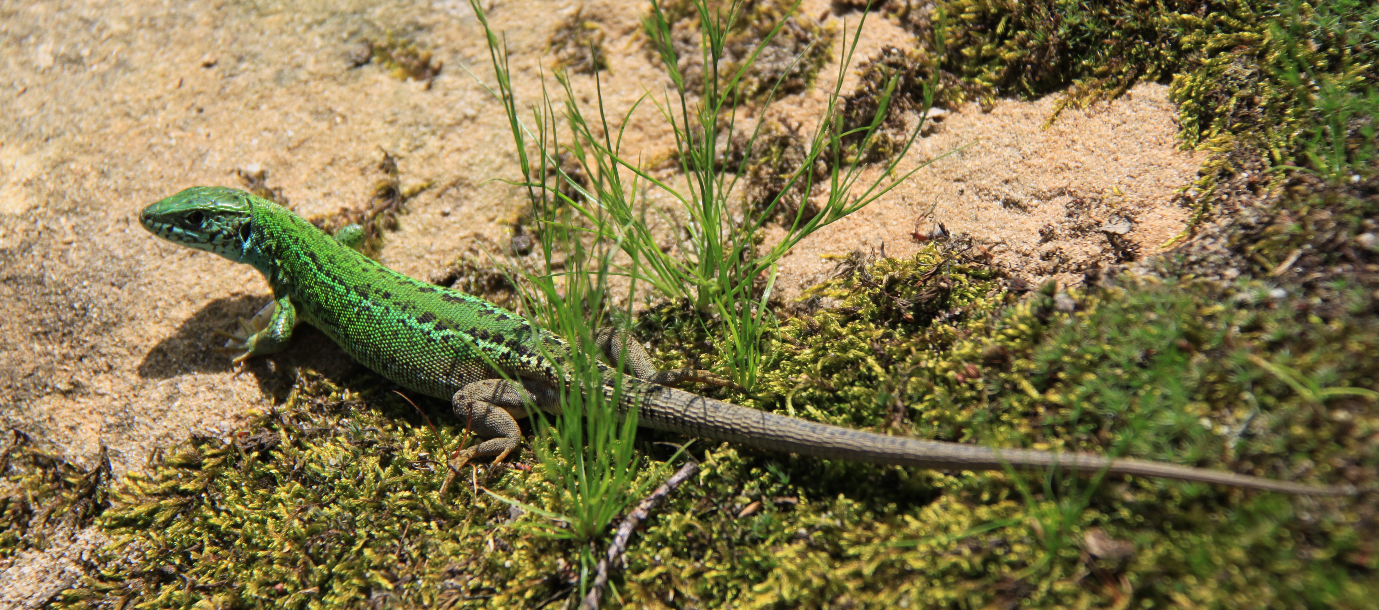 Galgaul Almasului – Salaj - Mai 2010